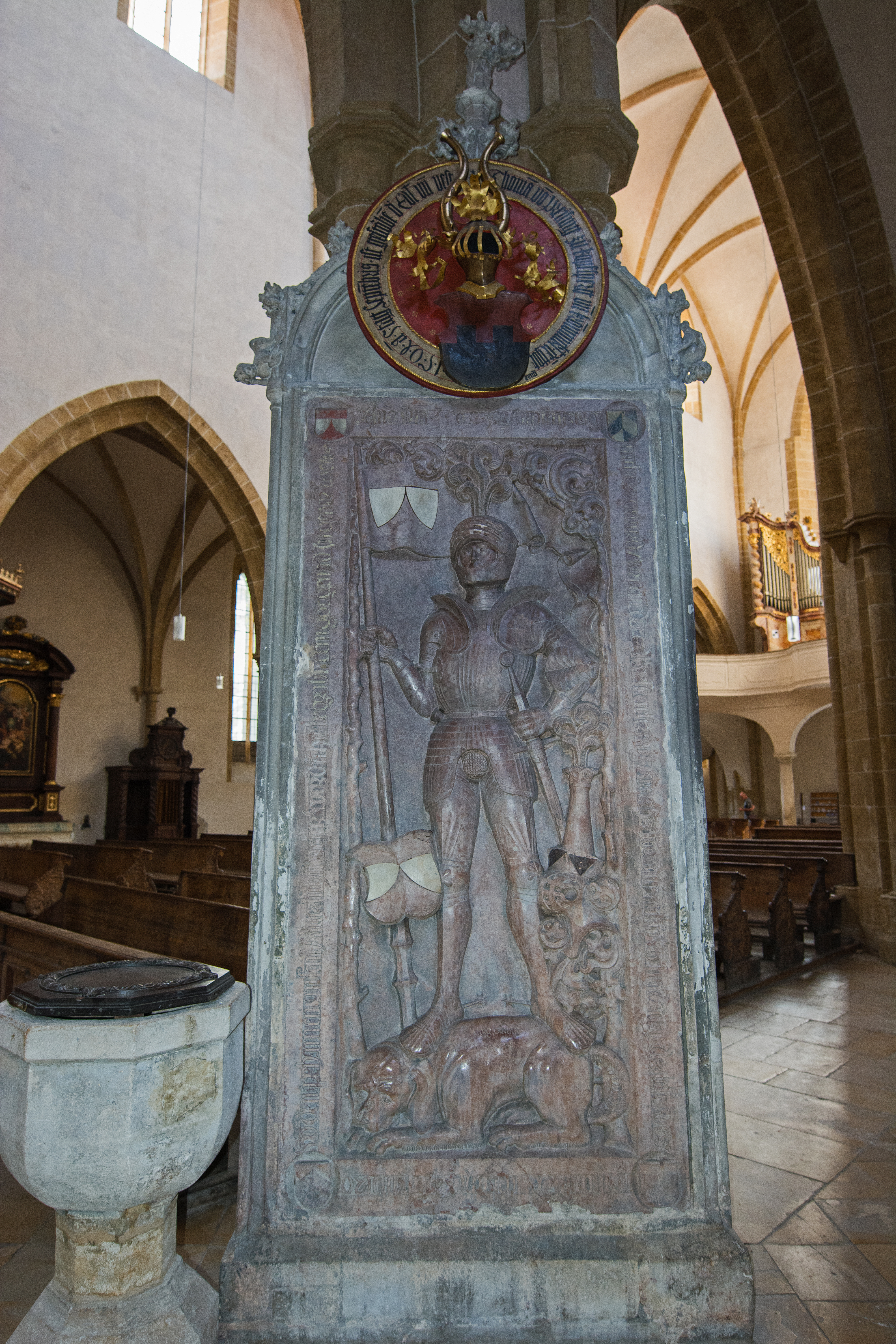 Die ehemalige Dominikanerkirche St. Blasius wurde von ca. 1246 bis 1384 erbaut (Chorbau vor 1246-79, Langhaus um 1280-1384). Sie ist die größte Kirche der Bettelorden in Süddeutschland. Am nordöstlichen Rand des Langhauses befindet sich das Epitaph für Jörg Schenk von Neideck, einen Ritter, der in der Schlacht von Schönberg 1504 im Lauf des Landshuter Erbfolgekriegs gefallen ist. D-3-62-000-24This is a photograph of an architectural monument.